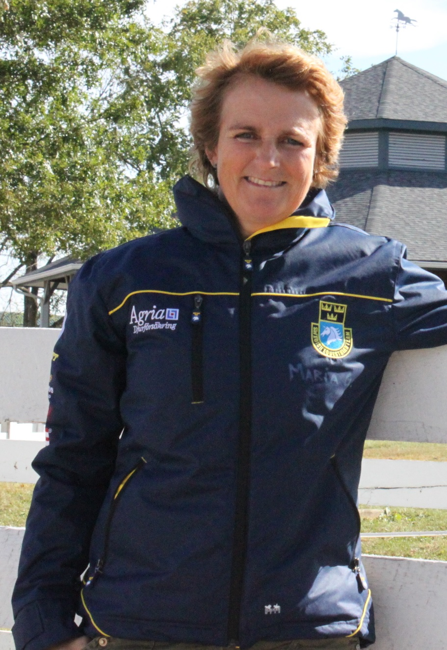 Hoppryttaren och f.d. förbundskaptenen Mara Gretzer.